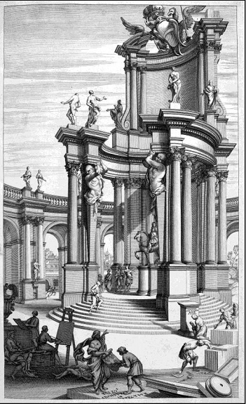 Ilustração em Perspectiva Pictorum et Architectorum